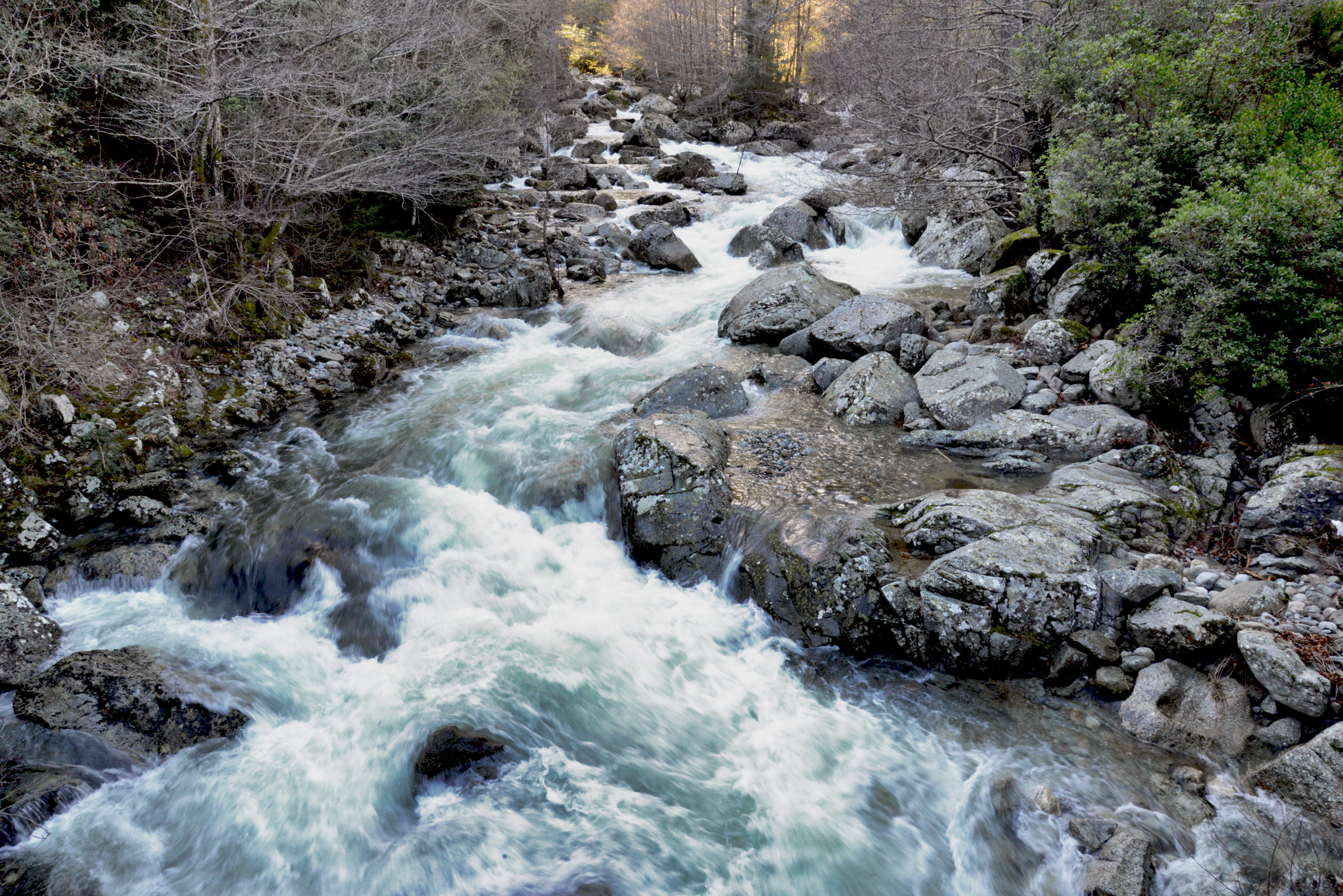 Vivario, Centre Corse (Haute-Corse) - Le Vecchio en amont du pont de Mulinello (route D23 menant au hameau de Canaglia)